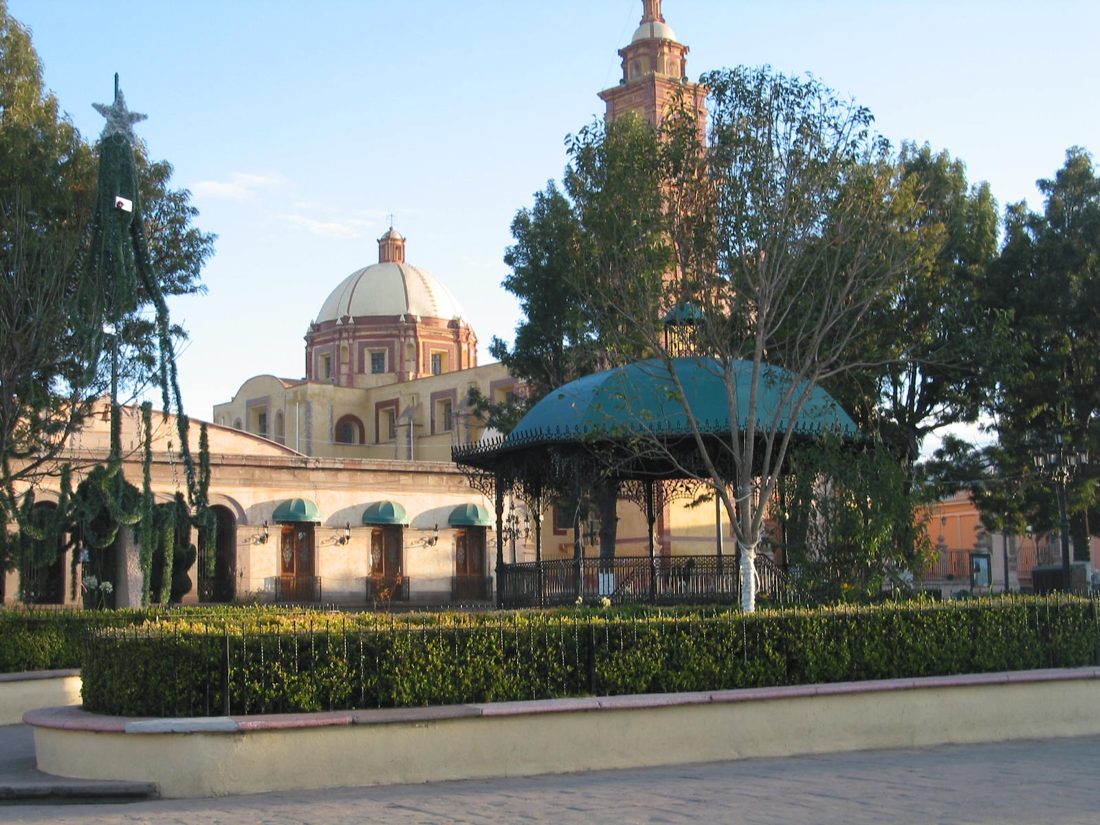 Centro de Tlaxco, Tlaxcala / Tlaxco Center, Tlaxcala